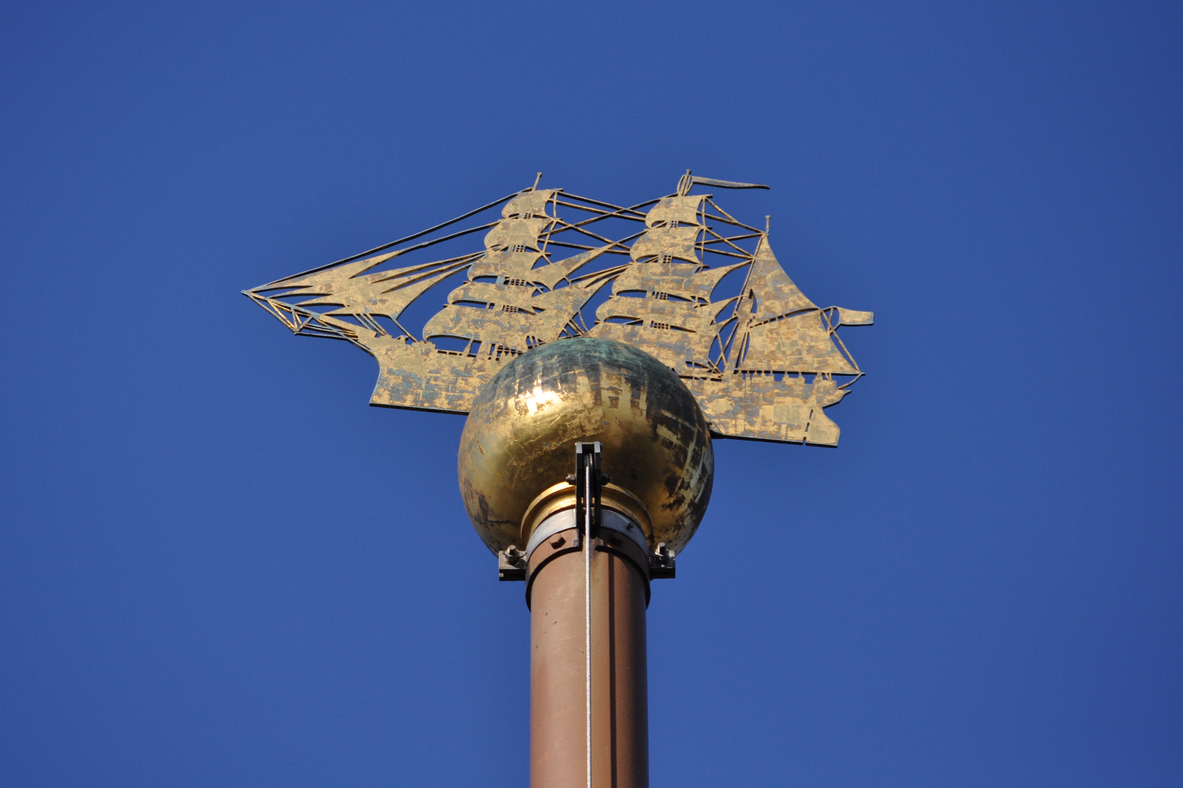 Spitze des südlichen Flaggenmastes auf dem Hamburger Rathausmarkt.